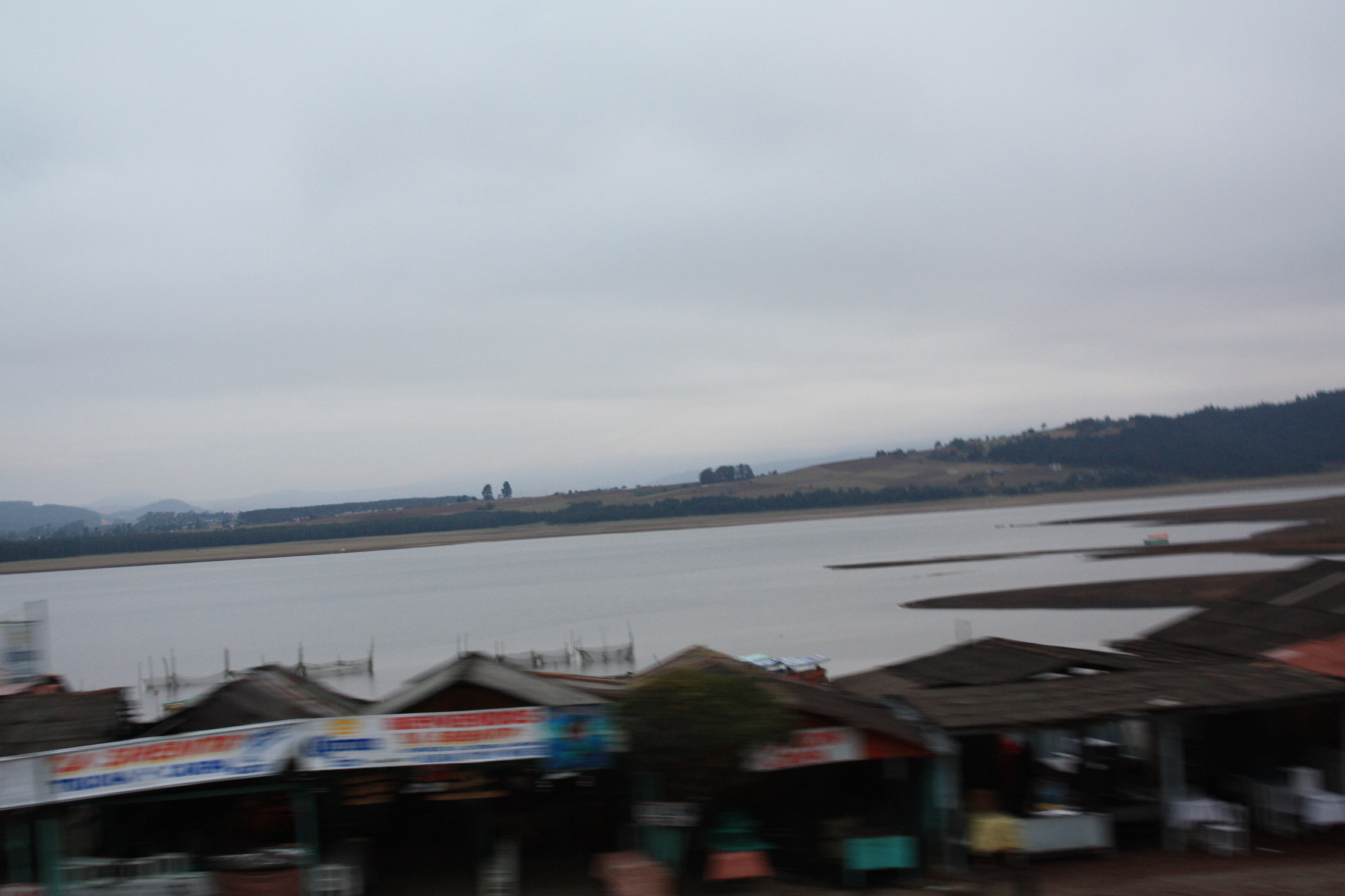 Presa El Tecojotal